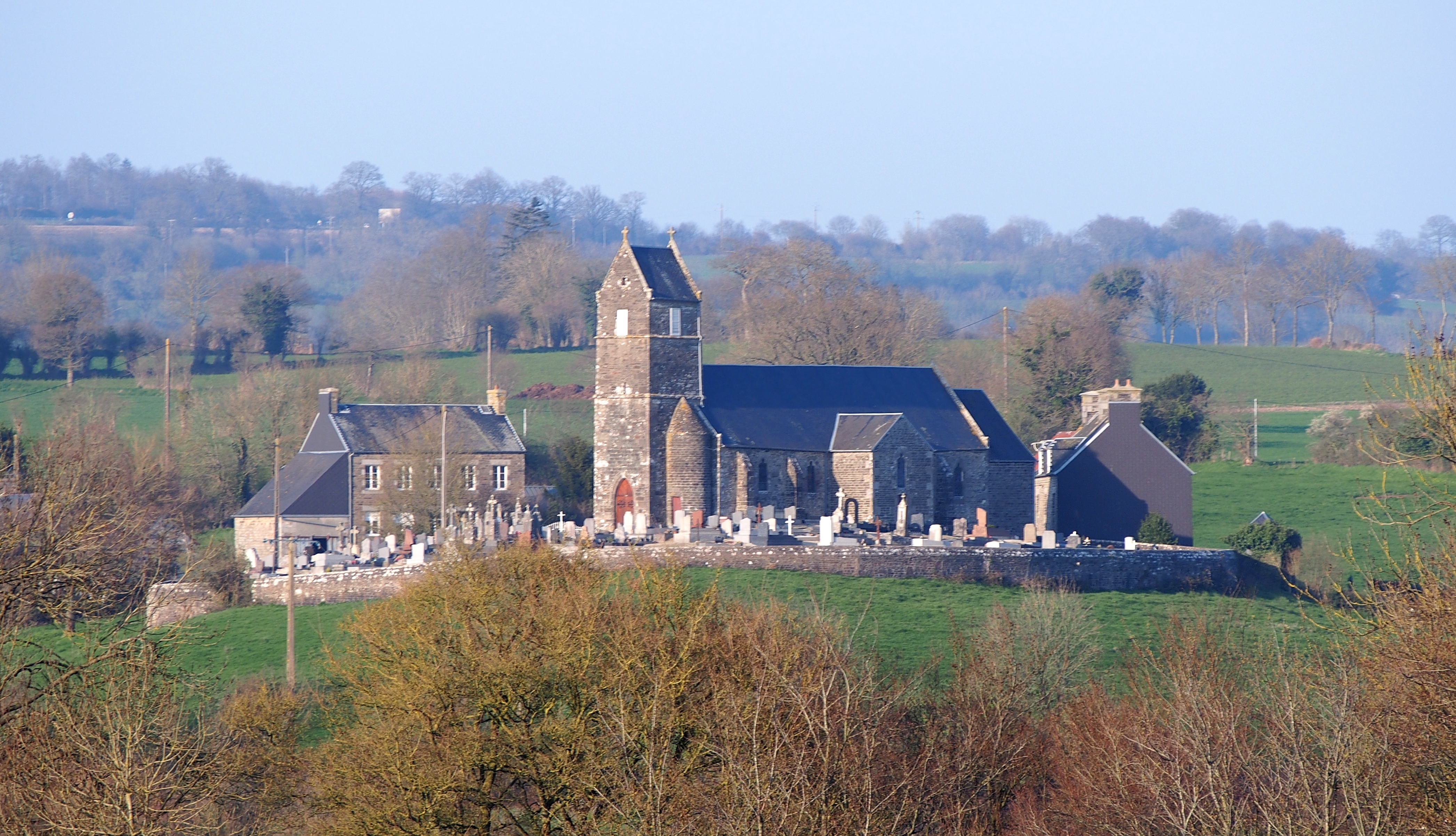 Pont-Farcy (Normandie, France). L'église Saint-Aubin et le bourg de Pleines-Œuvres, vus des hauteurs de Sainte-Marie-Outre-l'Eau.